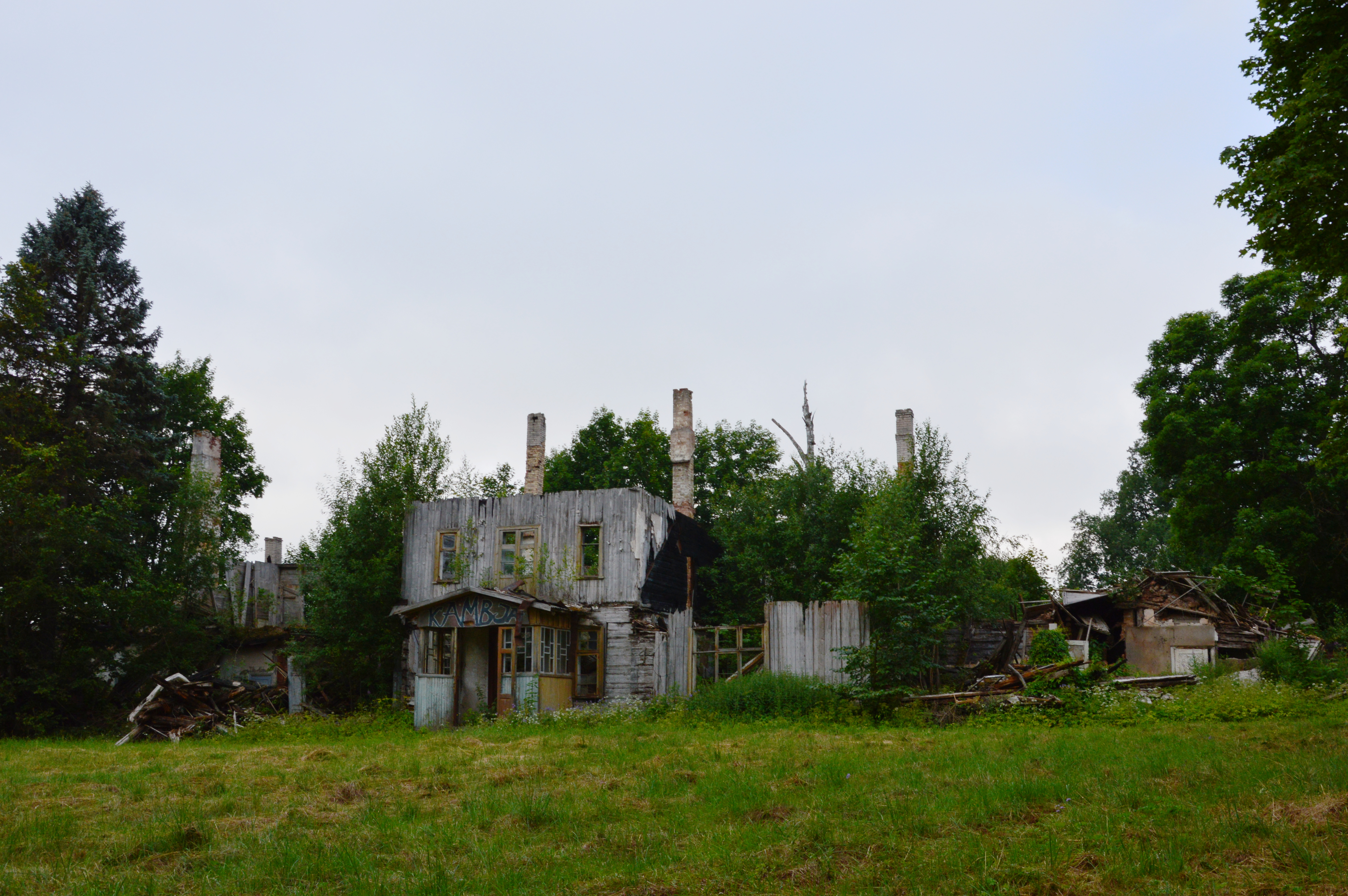 Suure-Kambja mõisa peahoone